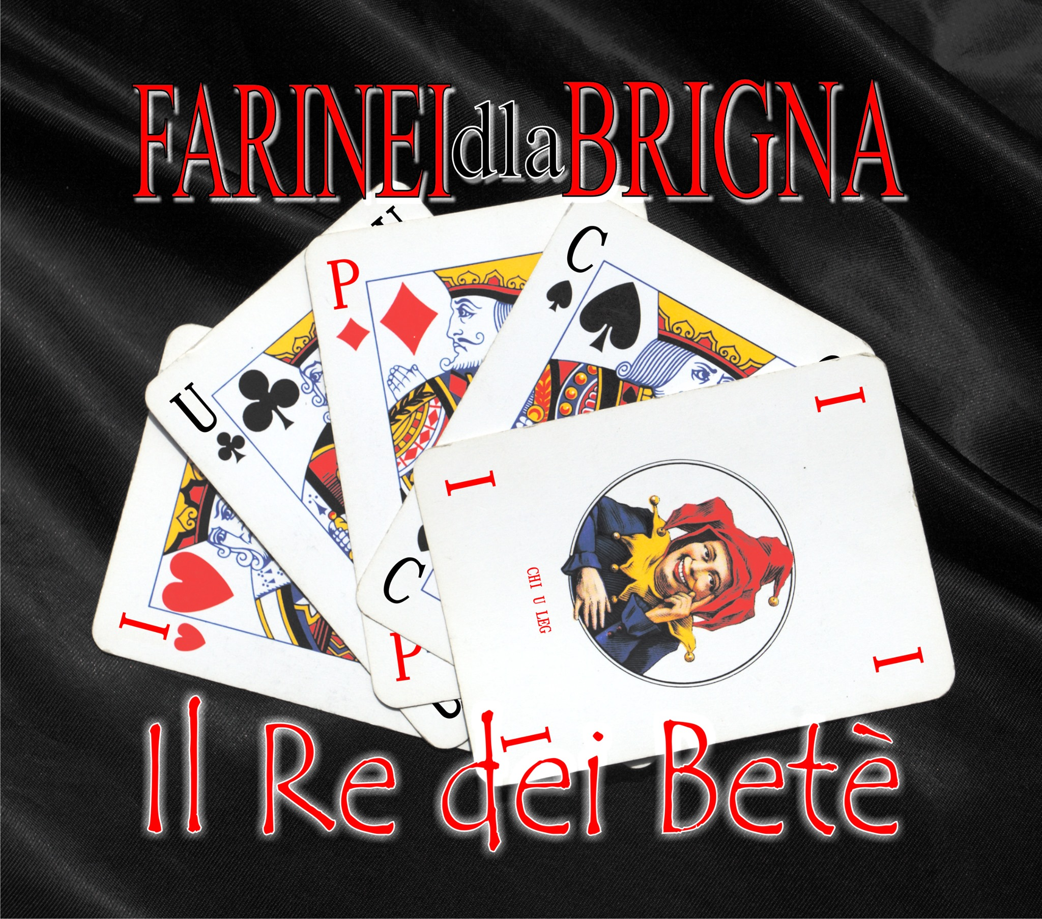 Ultimo lavoro in studio uscito il 13 luglio 2019. Con questo cd i Farinei si congedano dopo oltre 30 anni di carriera.